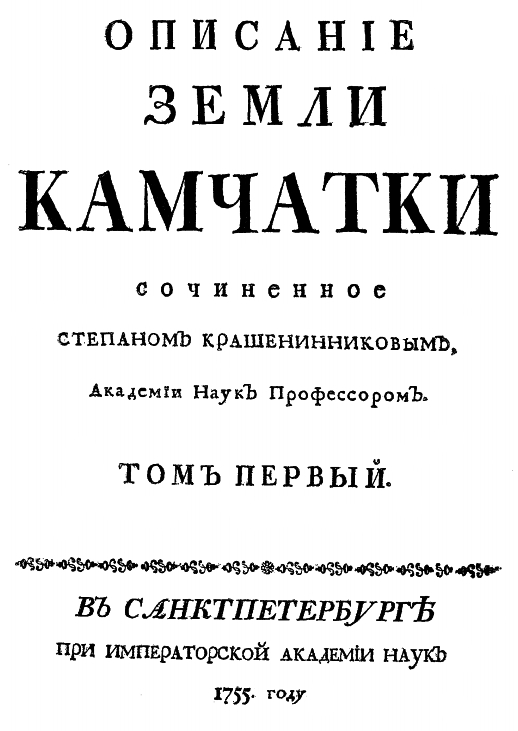 Крашенинников С.П. Описание Земли Камчатки. Санкт-Петербург: Императорская академия наук, 1755. Том 1.